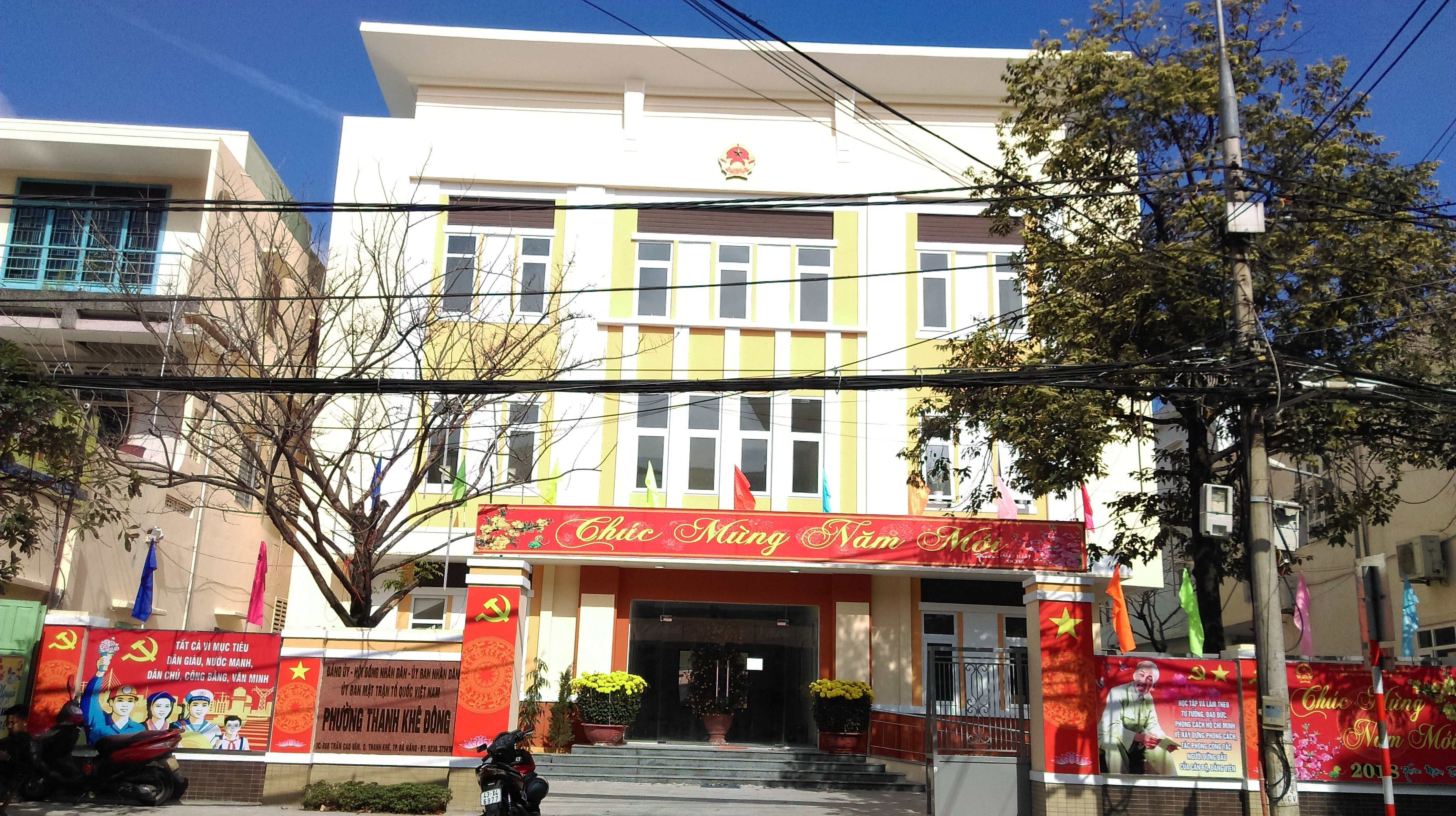 UBND phường Thanh Khê Đông, Thanh Khê, Đà Nẵng